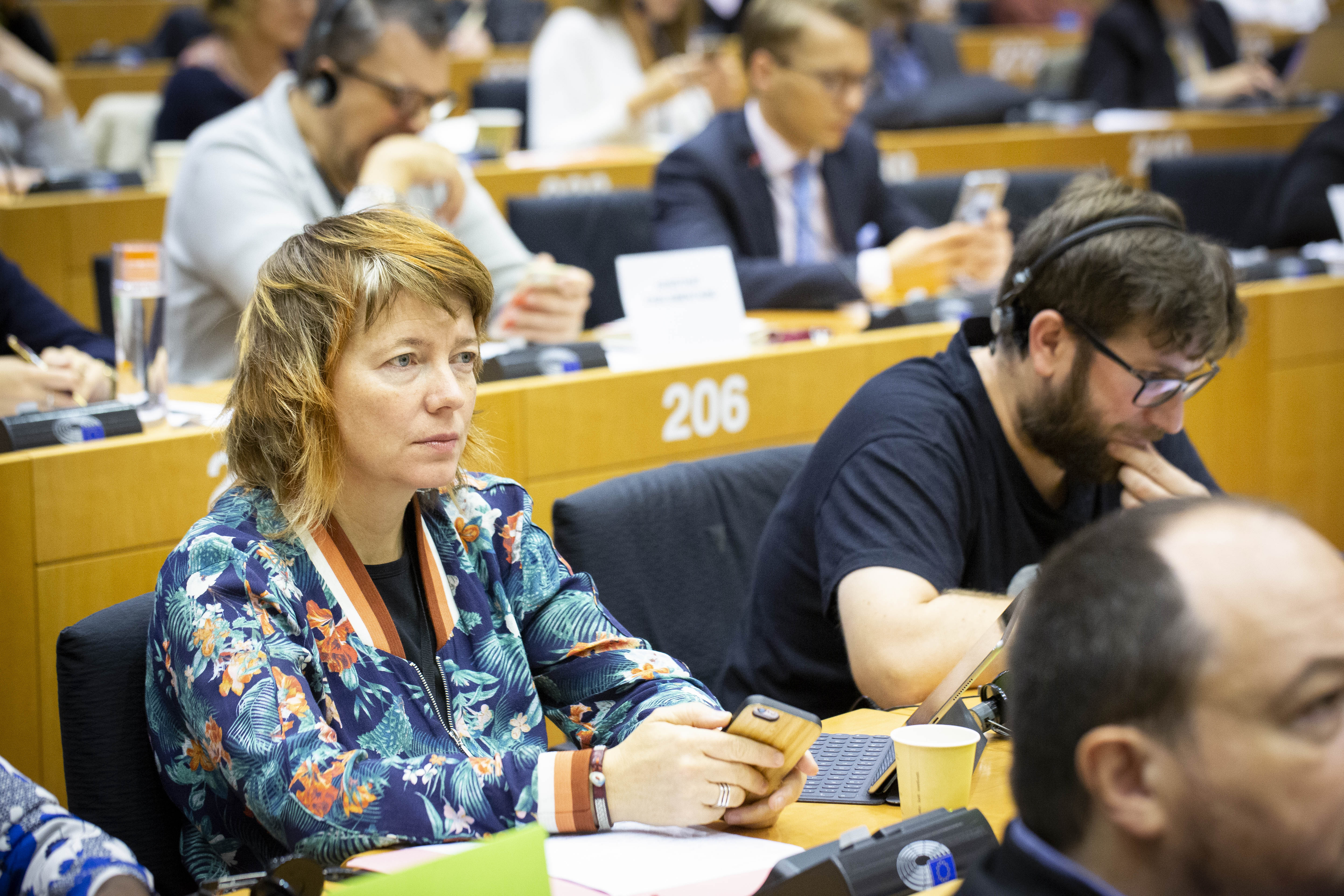 F70A8392-2